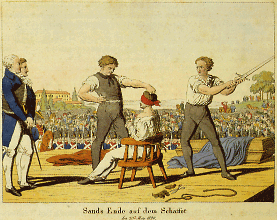 Die Hinrichtung von Karl Ludwig Sand am 20. Mai 1820. Kolorierter Kupferstich, vermutlich von J. M. Volz, gedruckt in Nürnberg bei A. P. Eisen um 1820.